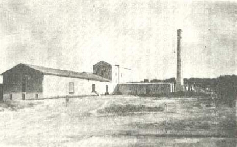 Molino del señor Dauvot, Moreno, provincia de Buenos Aires, 1870.